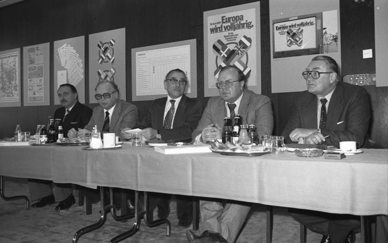 Pressekonferenz von Mitgliedern des Europa-Parlaments und der EG-Kommission zu den bevorstehenden Wahlen zum Europäischen Parlament im Presseclub in Bonn.